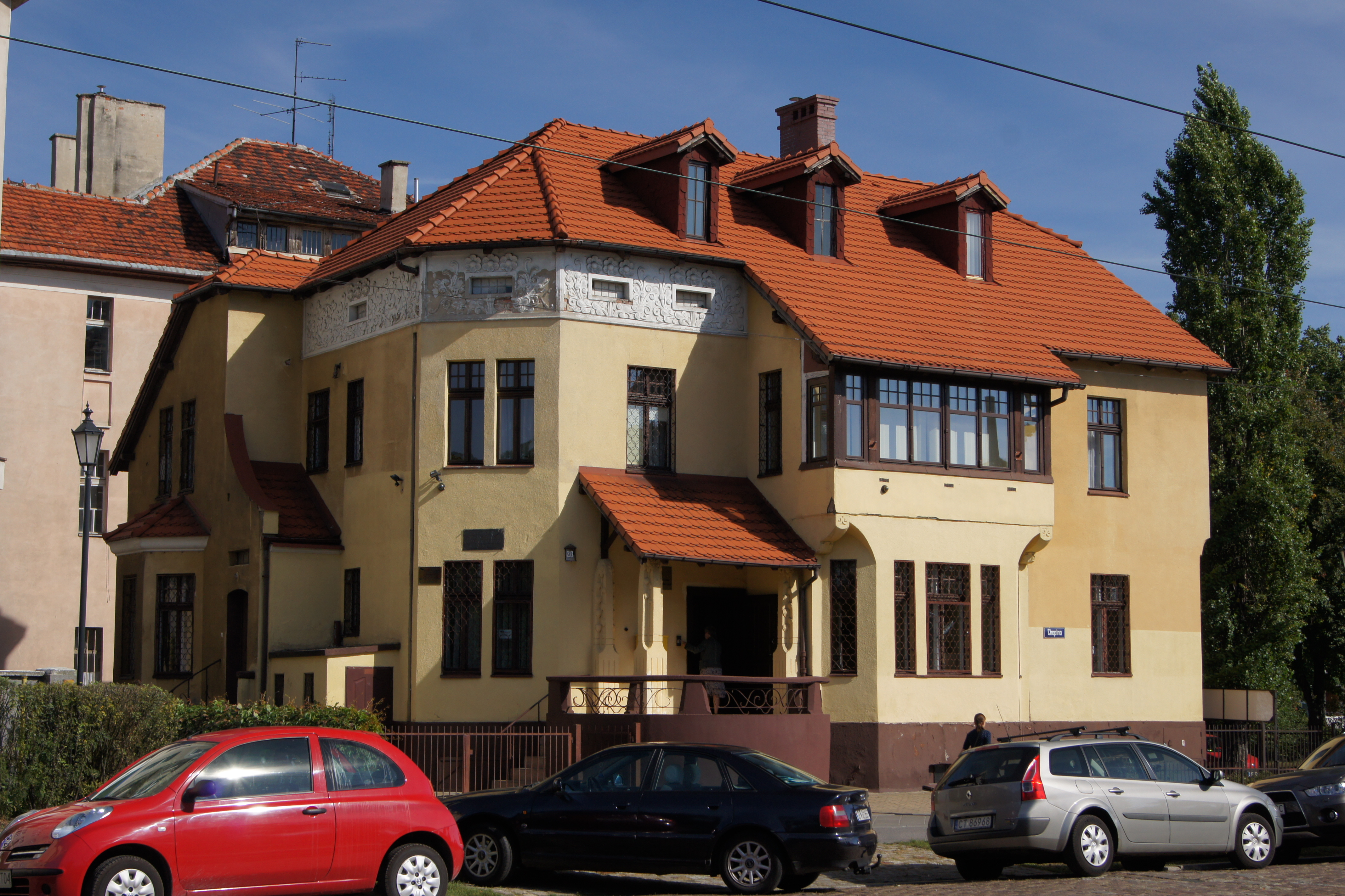 Toruń, ul. Chopina 20 / ul. Moniuszki 1 - willa, 1908 (zabytek nr A/109)